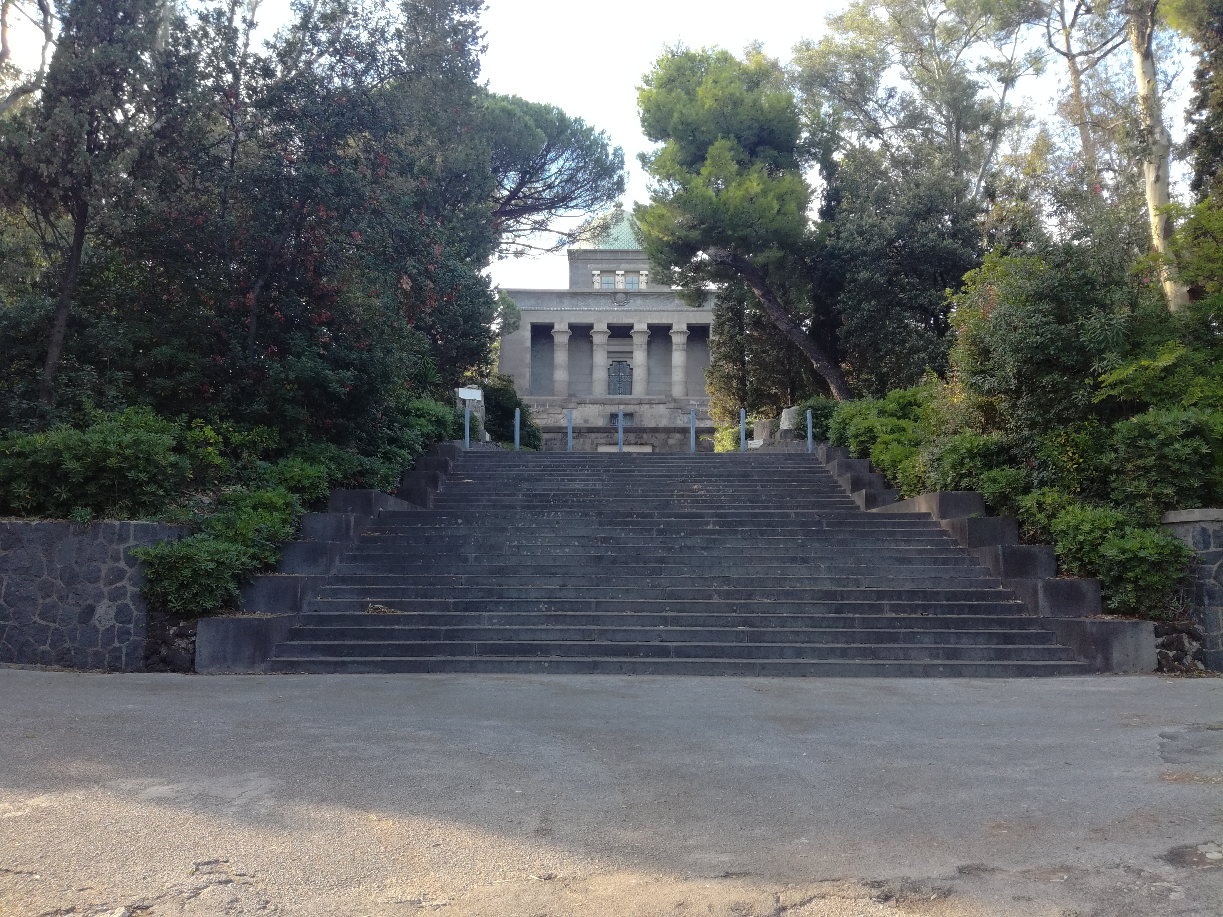 Mausoleo Schilizzi (Napoli)